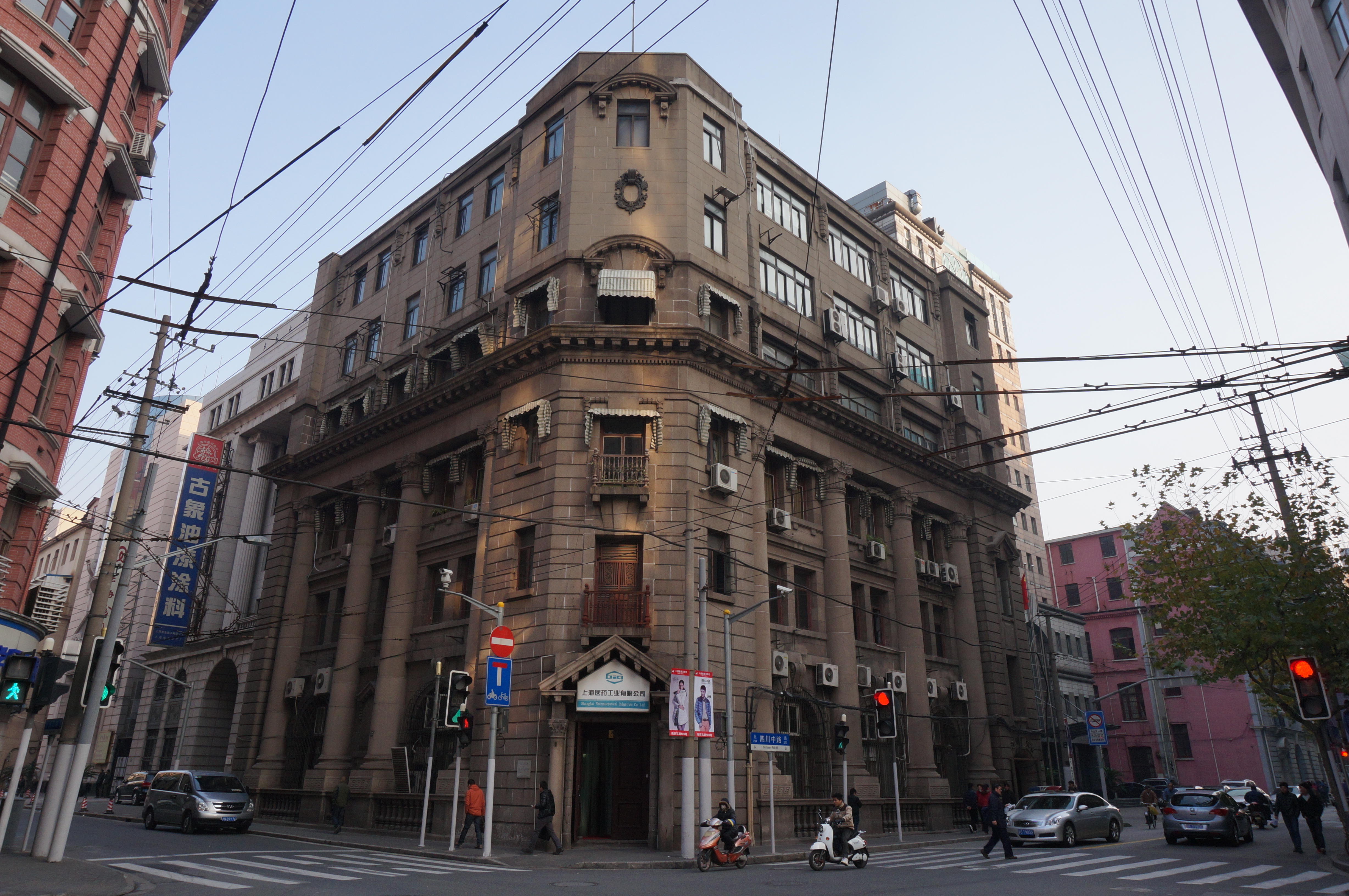 中文（中国大陆）: 江川大楼（德华银行）